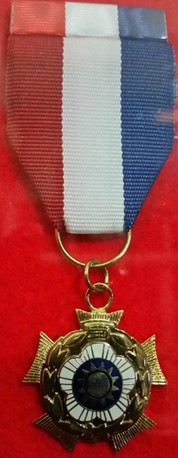 完整比例含勳表之陸官專五期崇勳紀念章